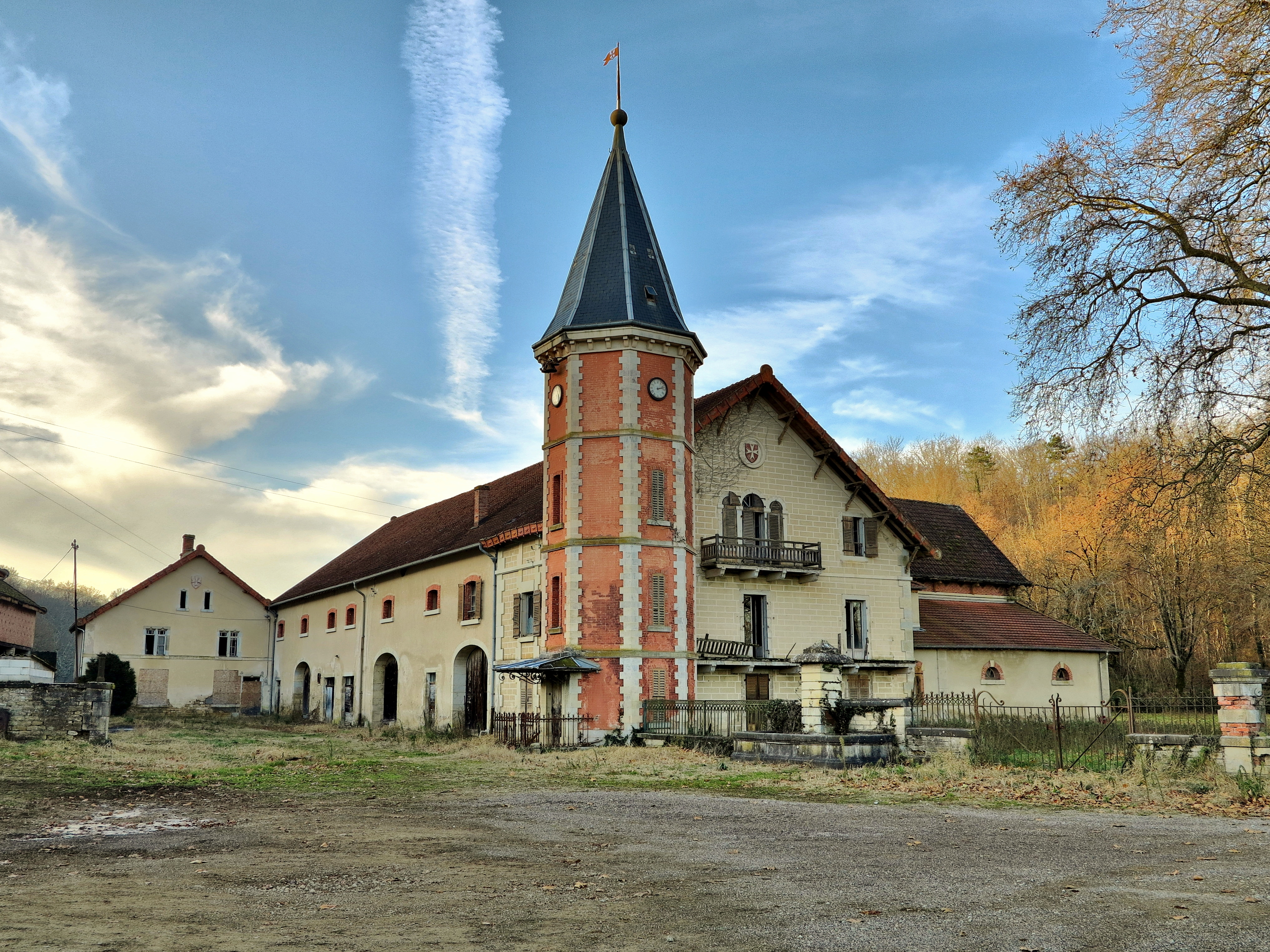 Ferme de Laine